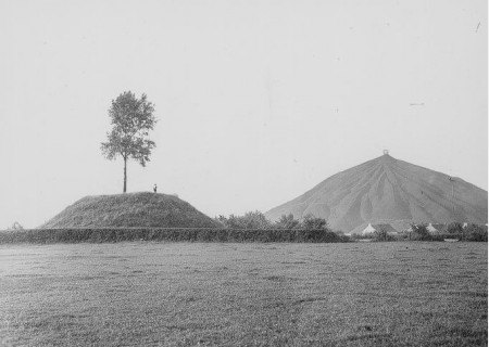 Tumulus de Marcinelle (Charleroi - Belgique)